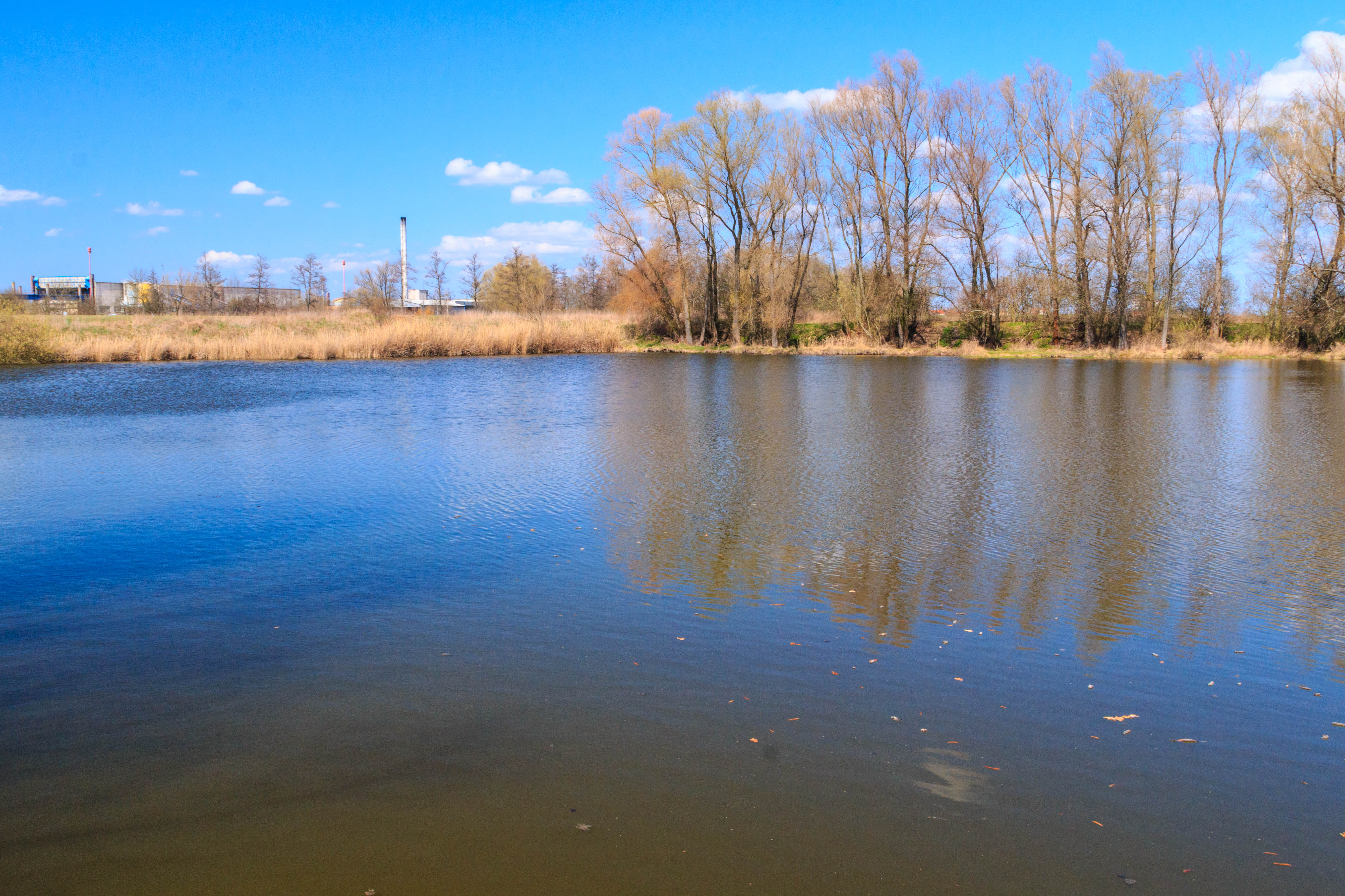 Písníky u Chudonic - písník I Project: Vodstvo.